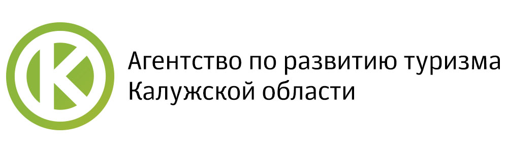 Логотип разработан студией Артемия Лебедева